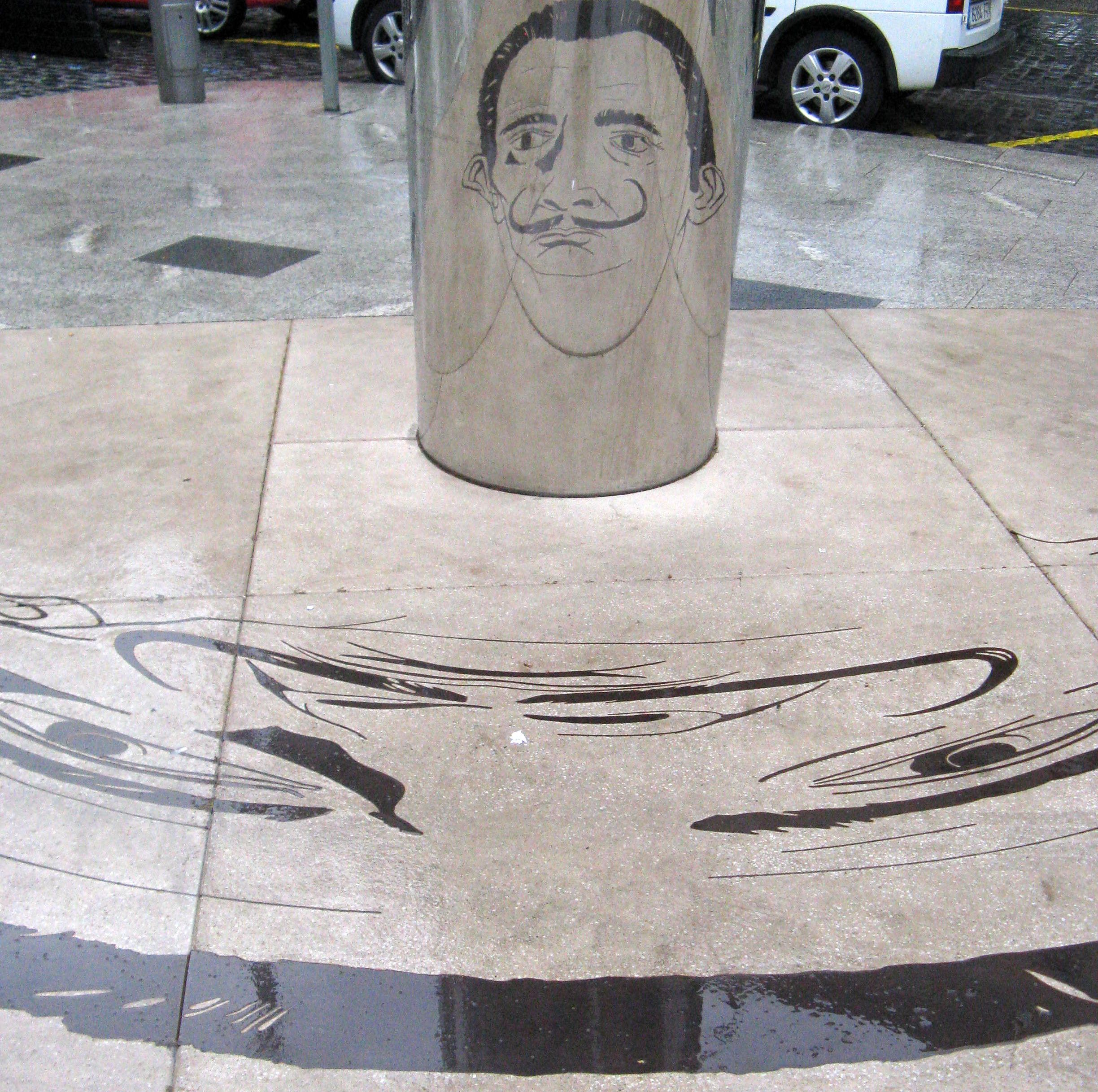 Anamorphose mit Salvador Dali in Figueres/Spanien; eine von Dali selbst angewendete Technik (verzerrte Zeichnung wird mit zylindrischem Spiegel entzerrt); die Zeichnung ist eine Kopie eines Selbstbildnisses